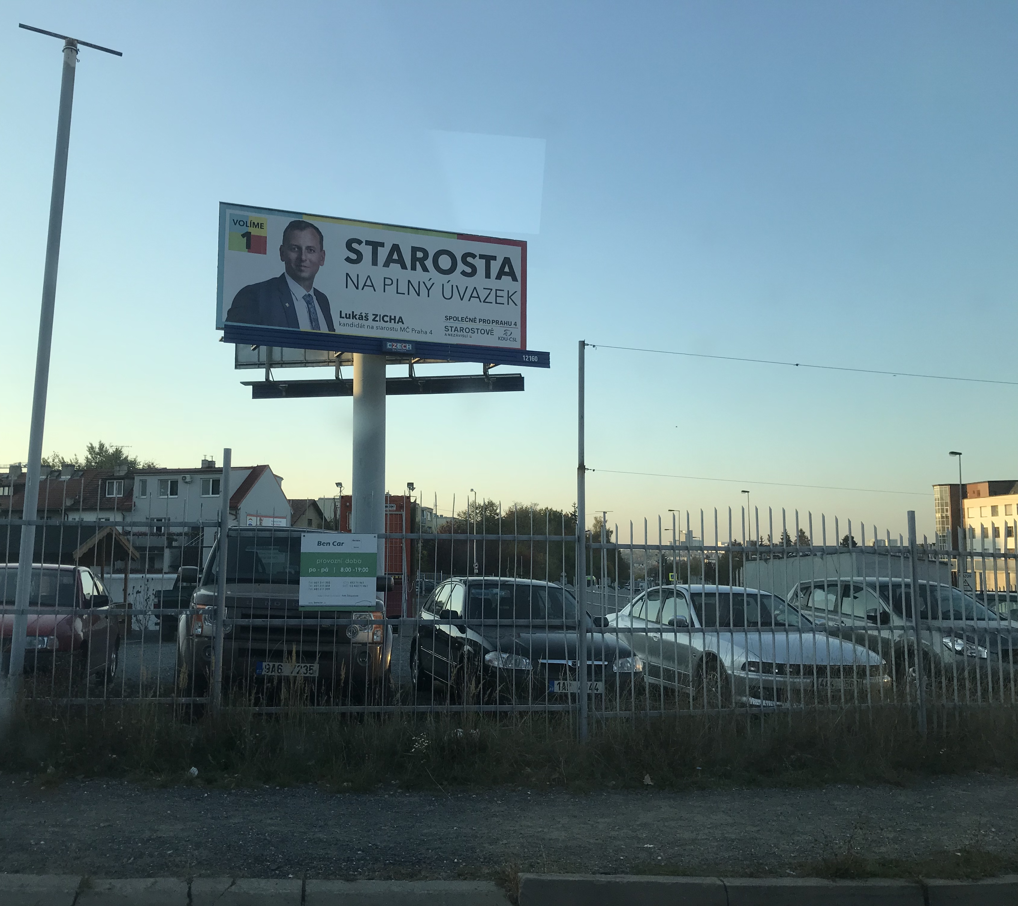 Plakát Starosta na plný úvazek Lukáš Zicha – Starostové a nezávislí, Společně pro Prahu 4. Vyfoceno u IKEMu